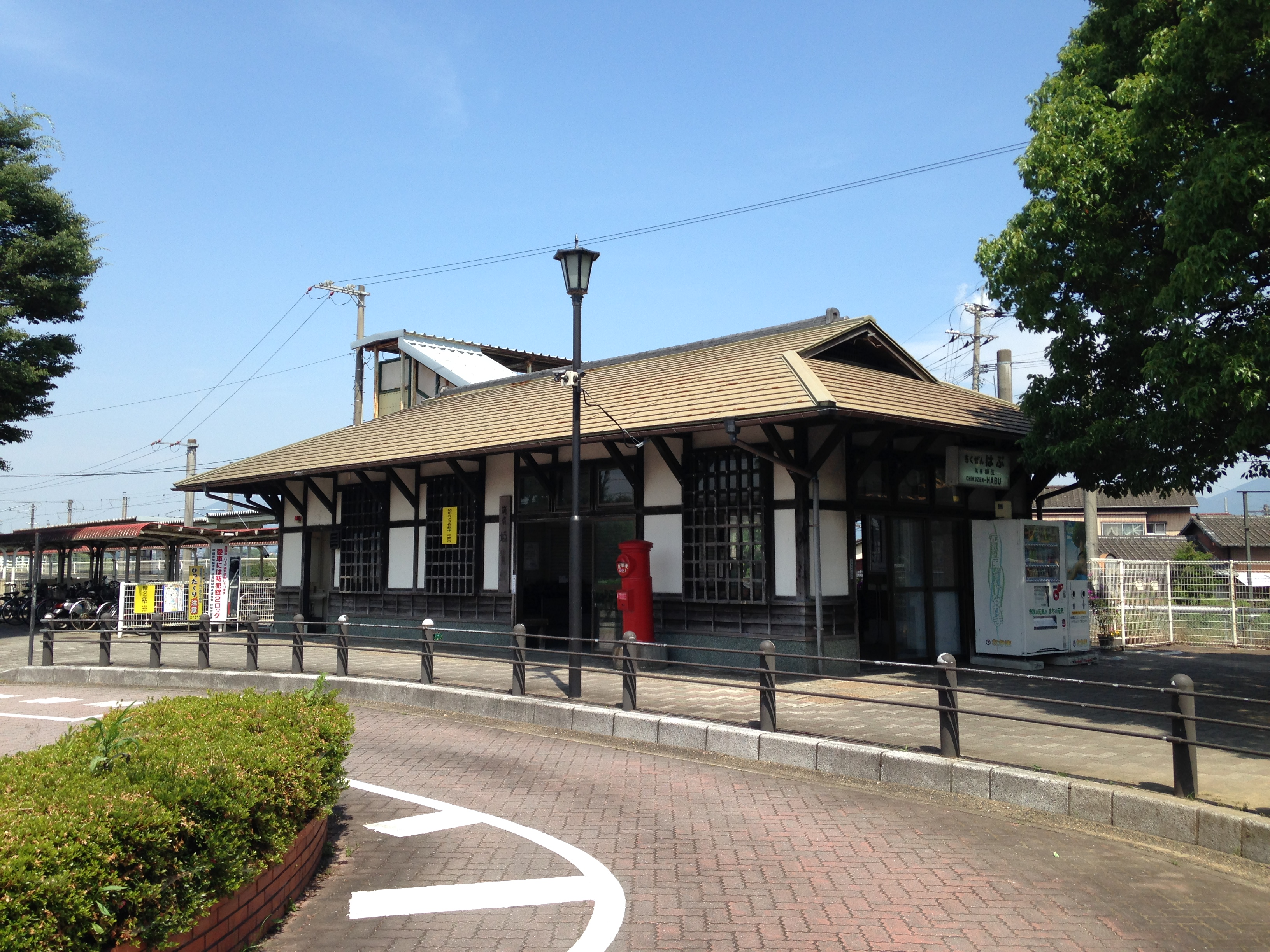 筑前垣生駅駅舎